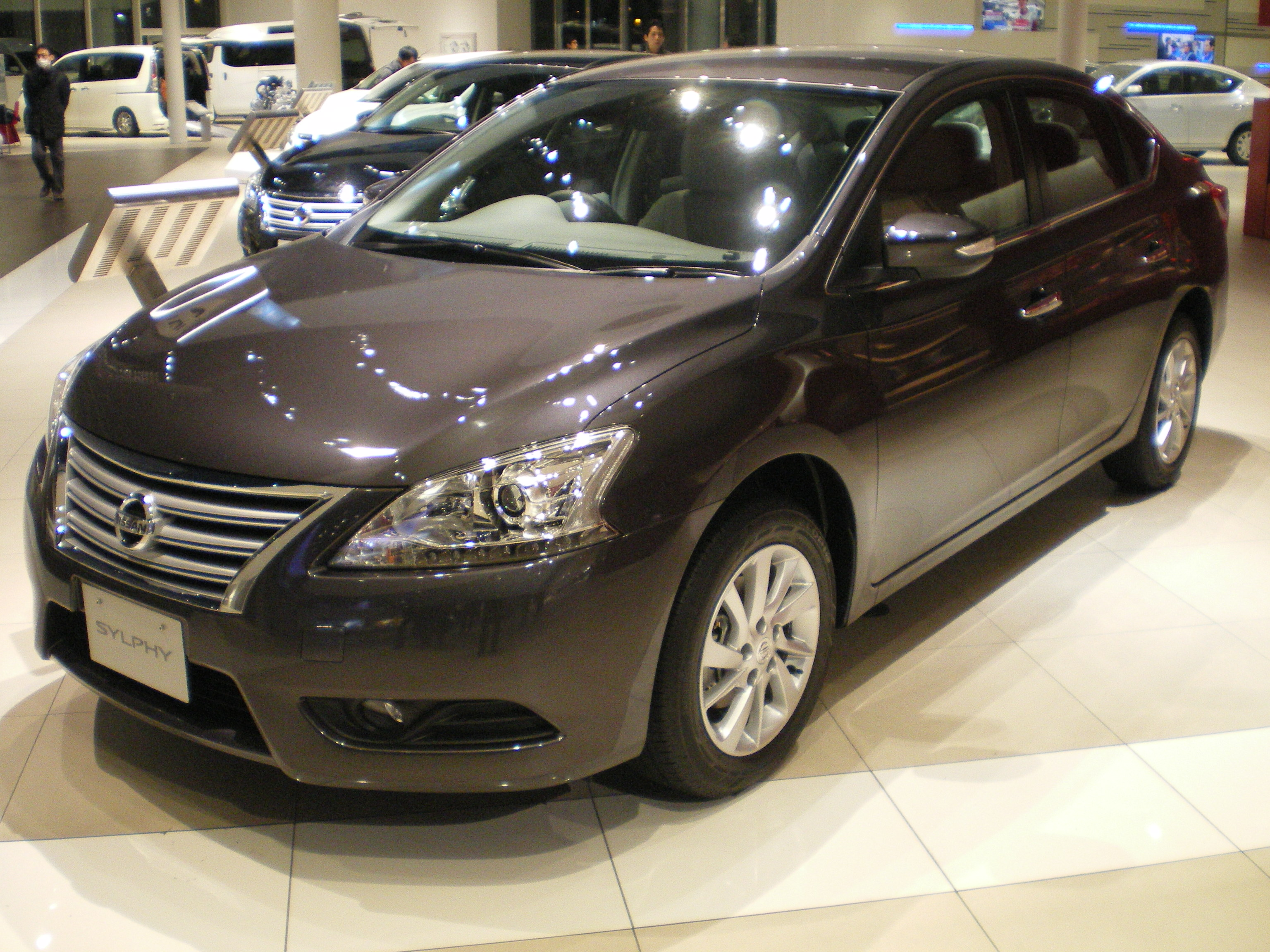 日産・シルフィ